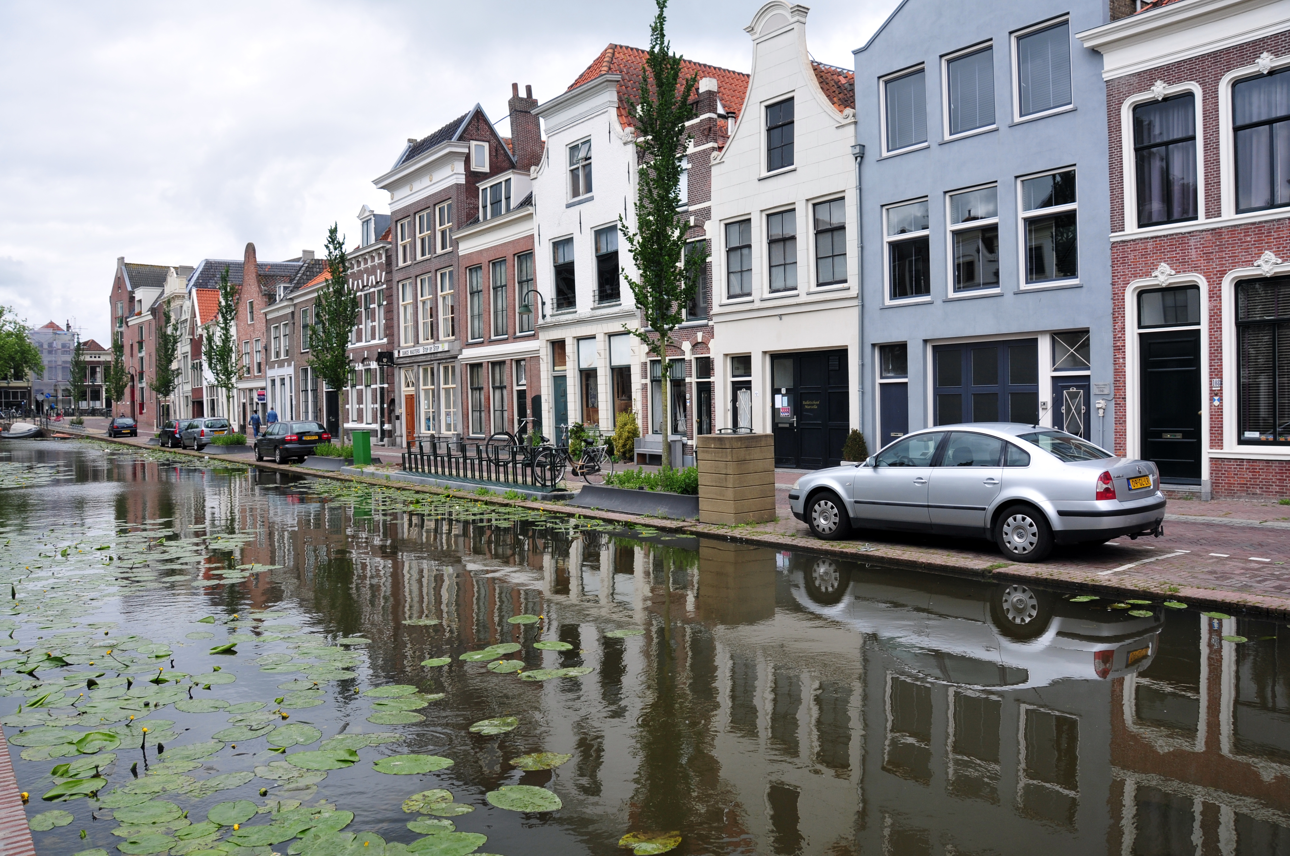 Gouda, Niederlande, Stadtzentrum